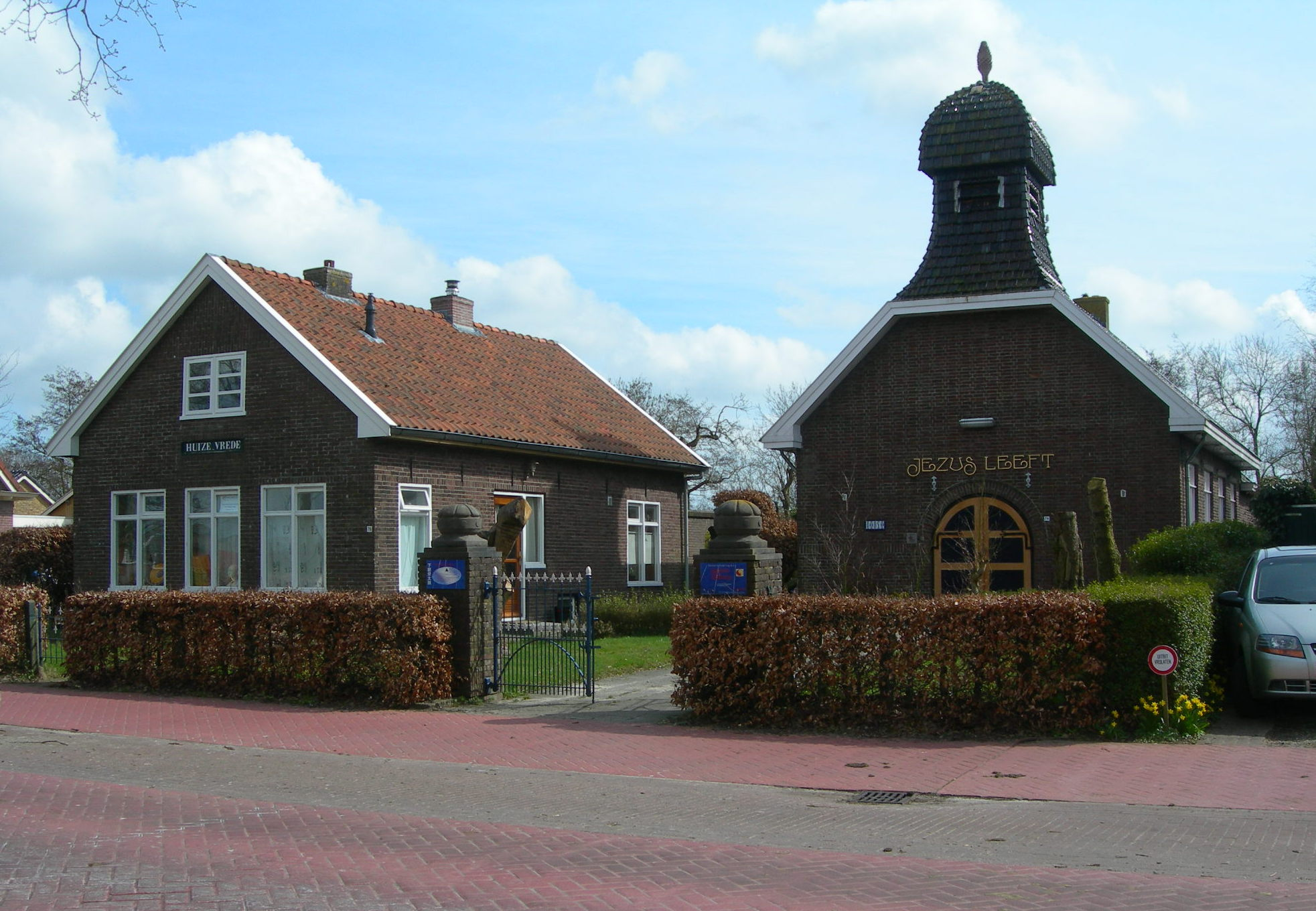 Kerk Jesus leeft (Drachtstercompagnie)